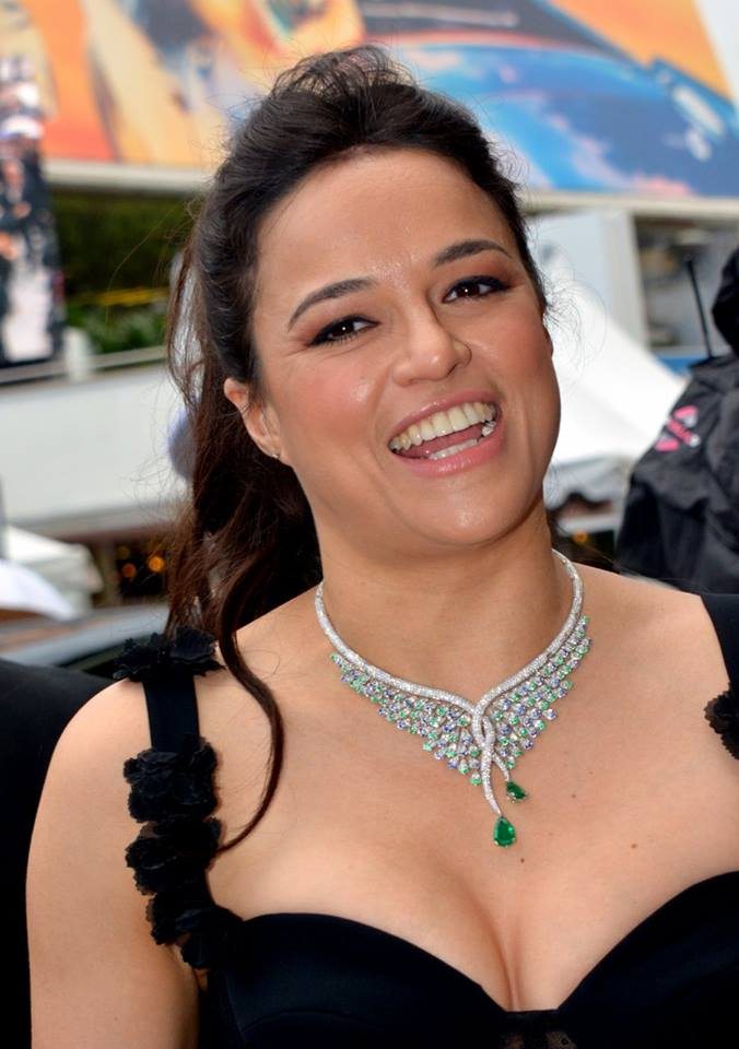 Michelle Rodriguez au festival de Cannes